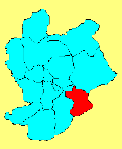 怀来县在张家口市的位置；此图片由王云峰wangyunfeng原创，用于WIKI。